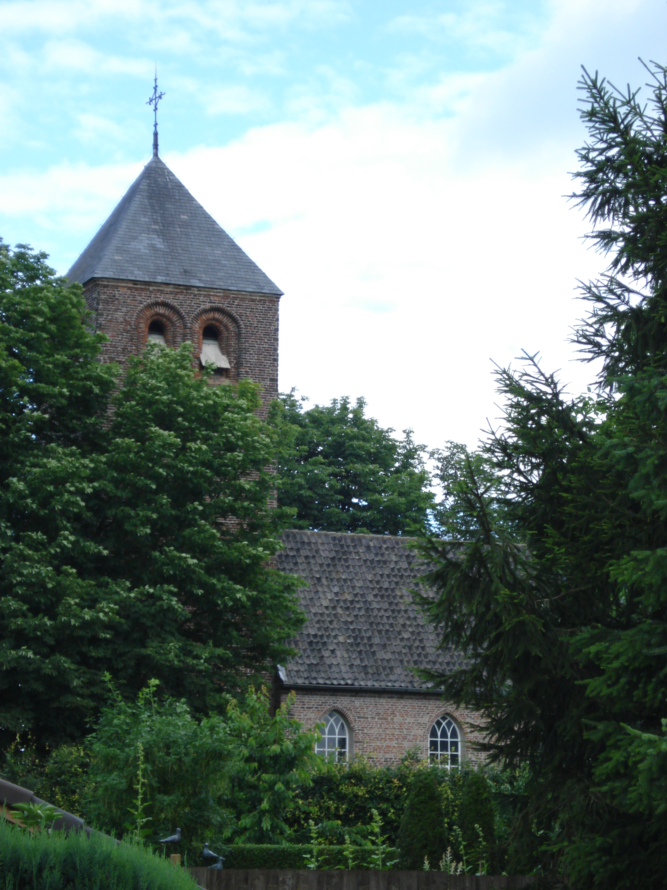 Dennenburg, l'église desaffecté